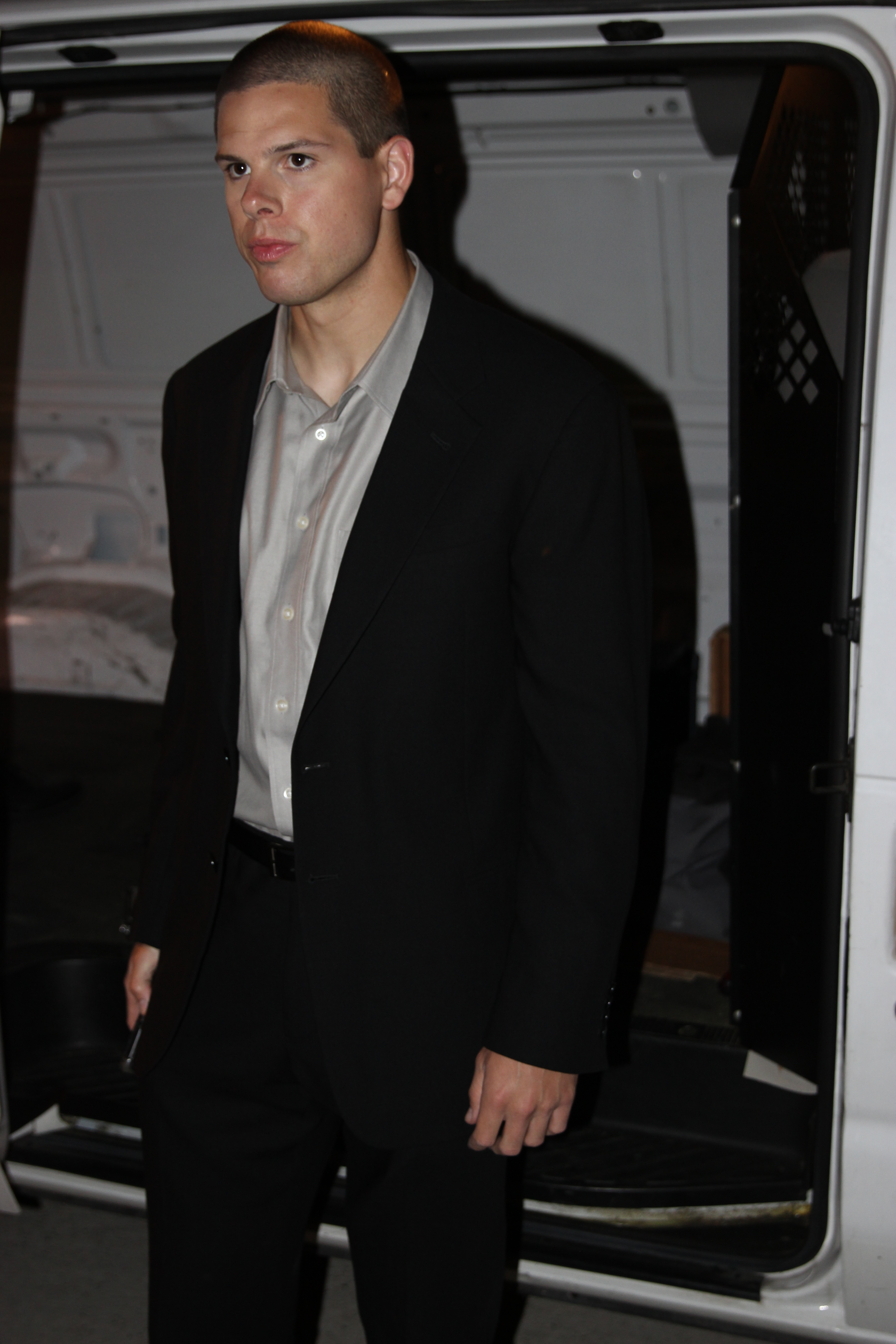 Keith Sutliff durante el rodaje de la película "The Mason Brothers" en Los Angeles (California)